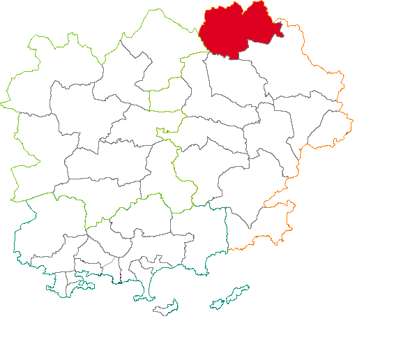 Situation du canton dans le département du Var